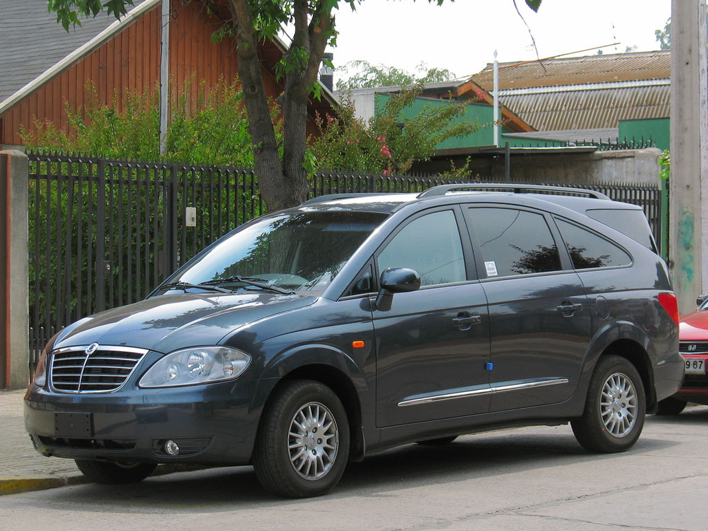 Ssangyong Stavic SV 270 CRDi 2011